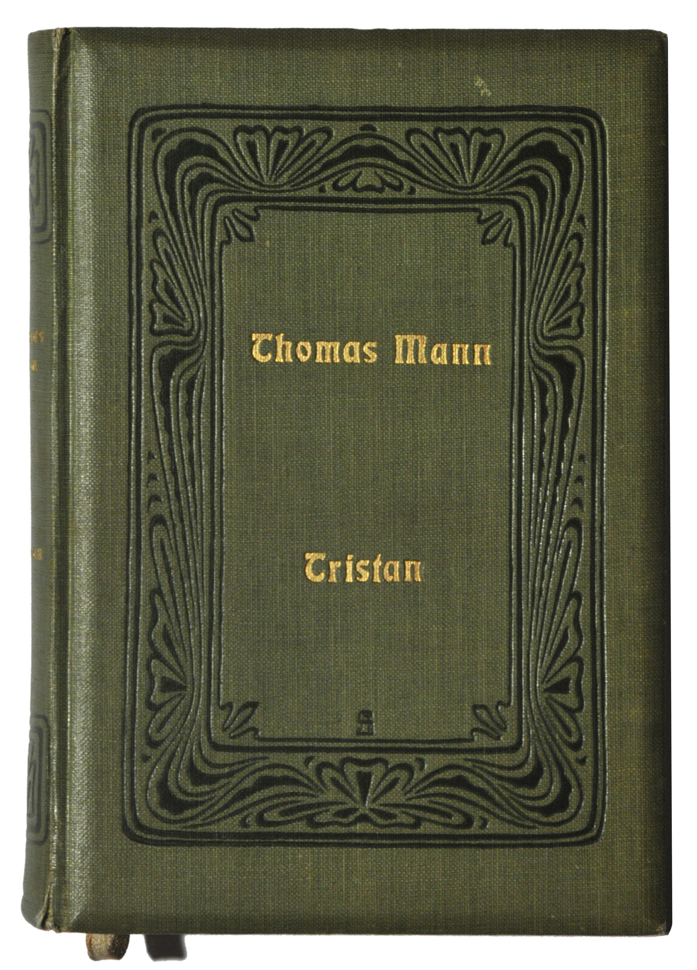 Tristan. Sechs Novellen. [1] Berlin: S. Fischer 1903, 264 Seiten. Erstausgabe (Potempa B 2 [2], Bürgin I 3, Wilpert/Gühring² 4). Grünes Orig.- Leinen 18,5 x 13 cm. Titel und Autor in Goldprägedruck auf Vorderdeckel und Rücken, Kopfgoldschnitt. Jugendstildekor in schwarzem Prägedruck auf Vorderdeckel und Rücken, Verlagssignet in schwarzem Prägedruck auf dem Hinterdeckel.